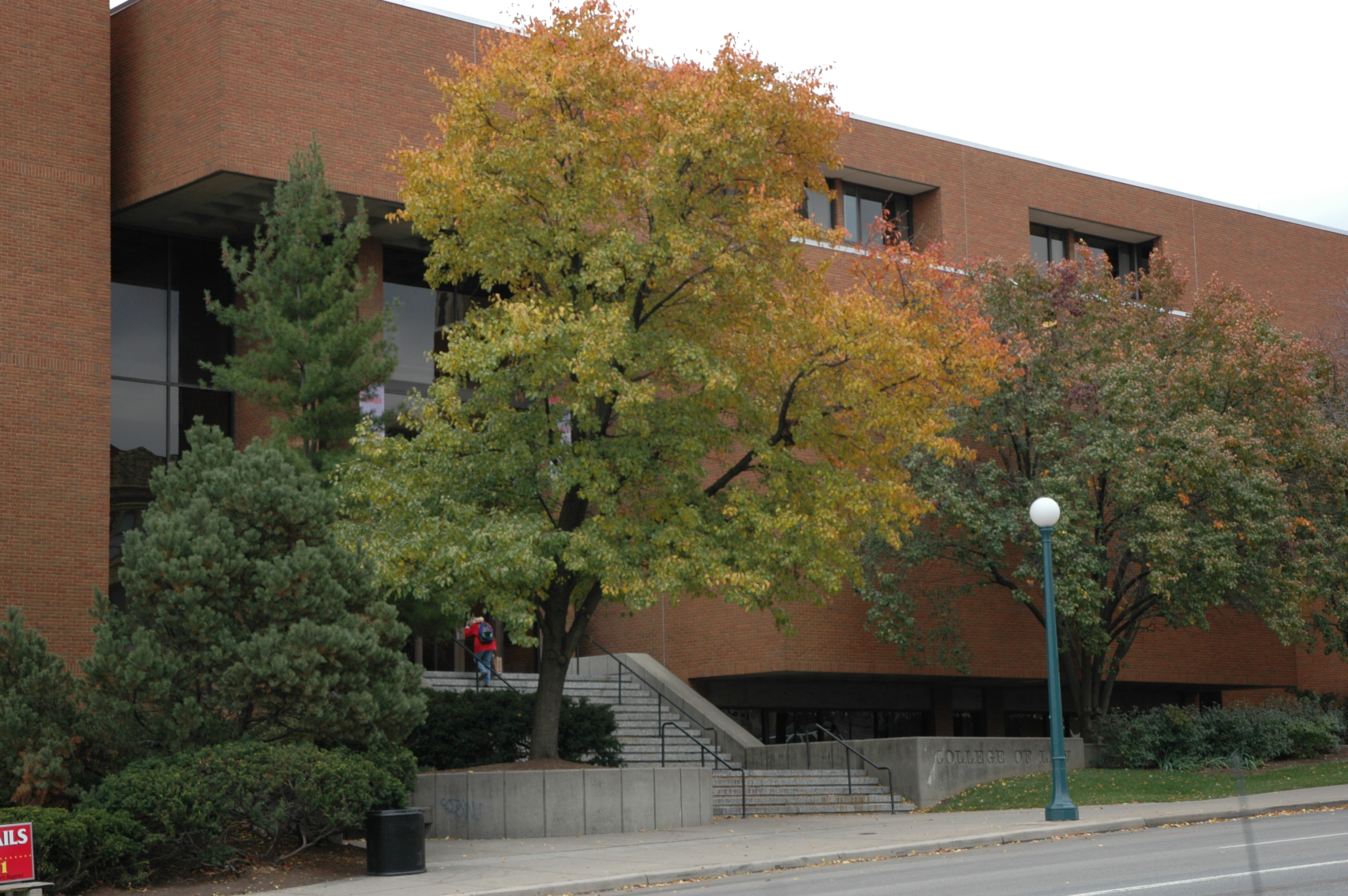 Front Entrance